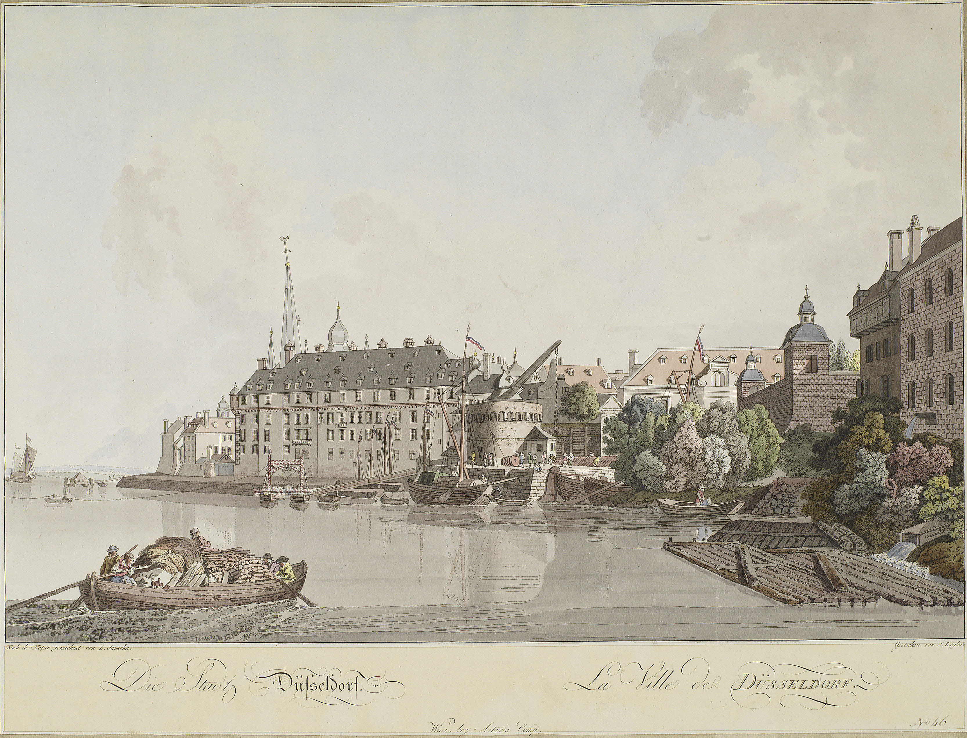 Düsseldorf